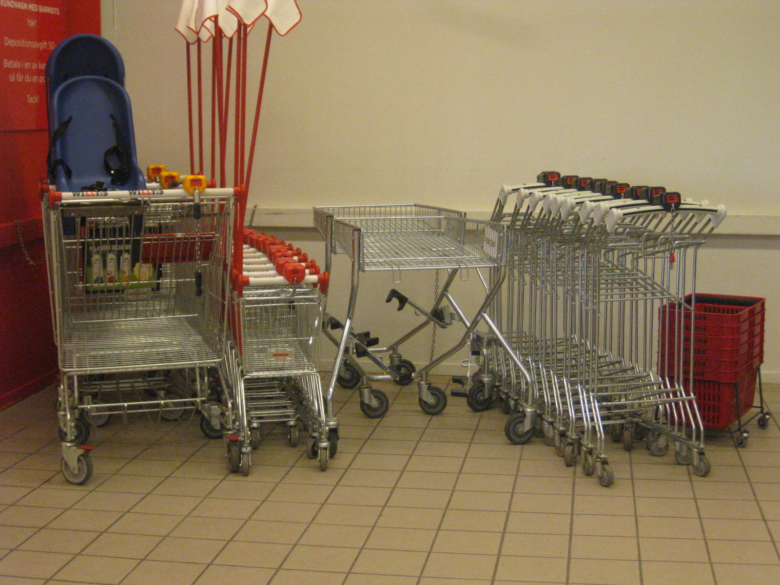 Olika sorter kundvagnar.